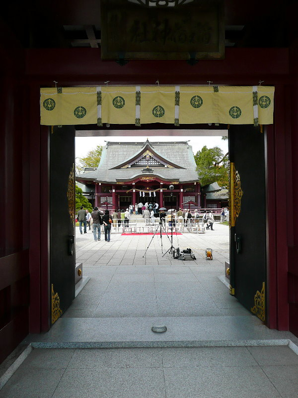 笠間稲荷神社・楼門から見た拝殿